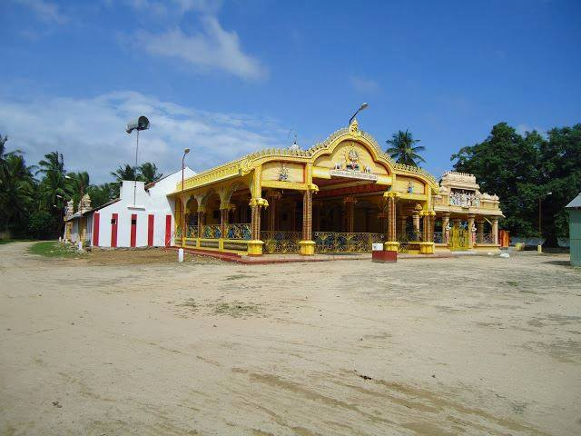 கோவில்கடவைகோவில்